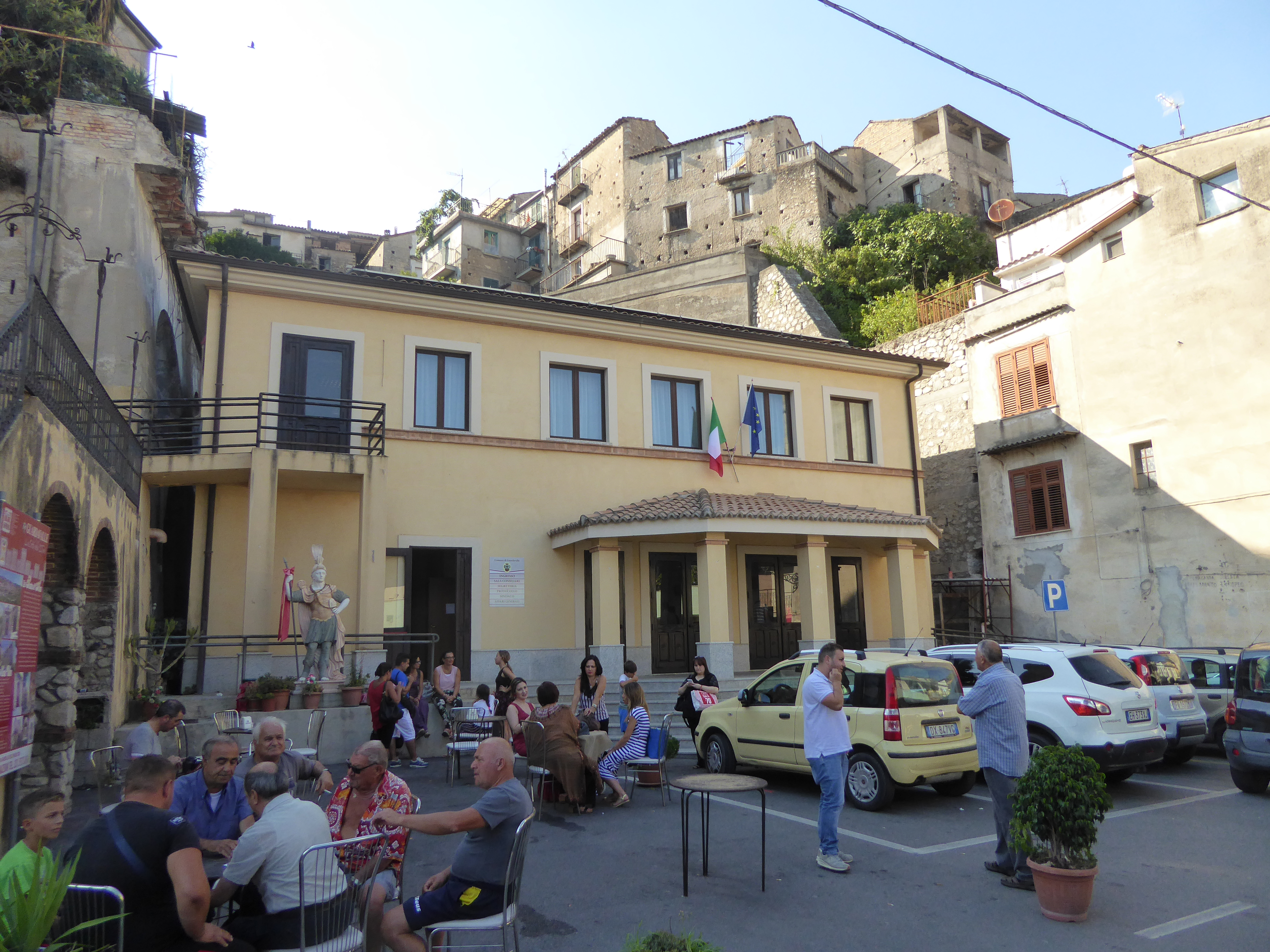 Comune di Guardavalle - ingresso principale con parcheggio (agosto 2019)